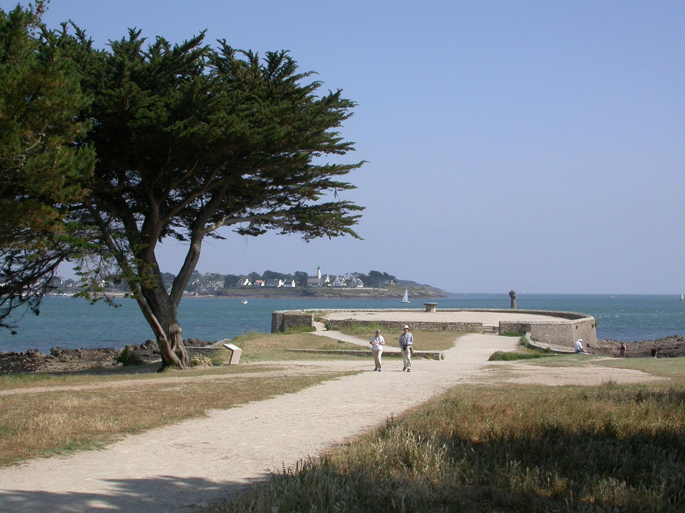 Pointe de Kerpenhir à Locmariaquer.